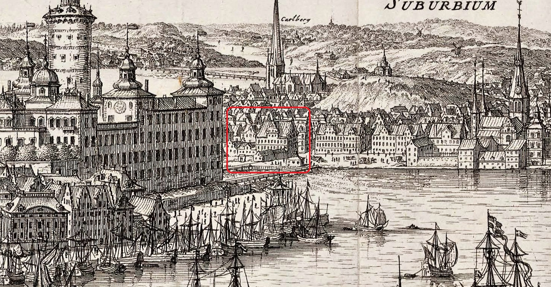 Del av Stockholm sett från Kastellholmen i Suecia Antiqua et Hodierna, med Torstensonska palatset inom röd ram